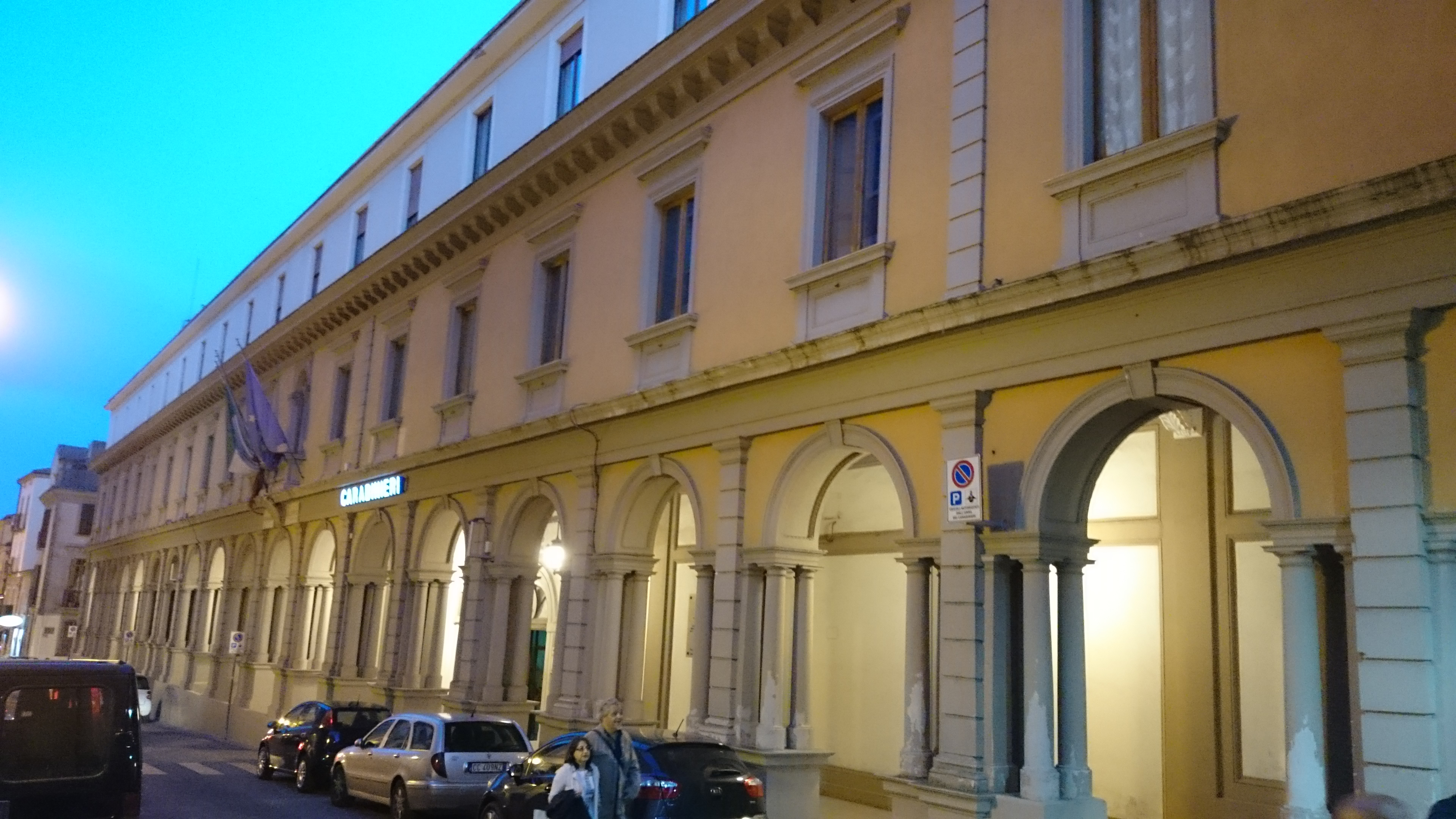 Potenza: Monastero di San Luca